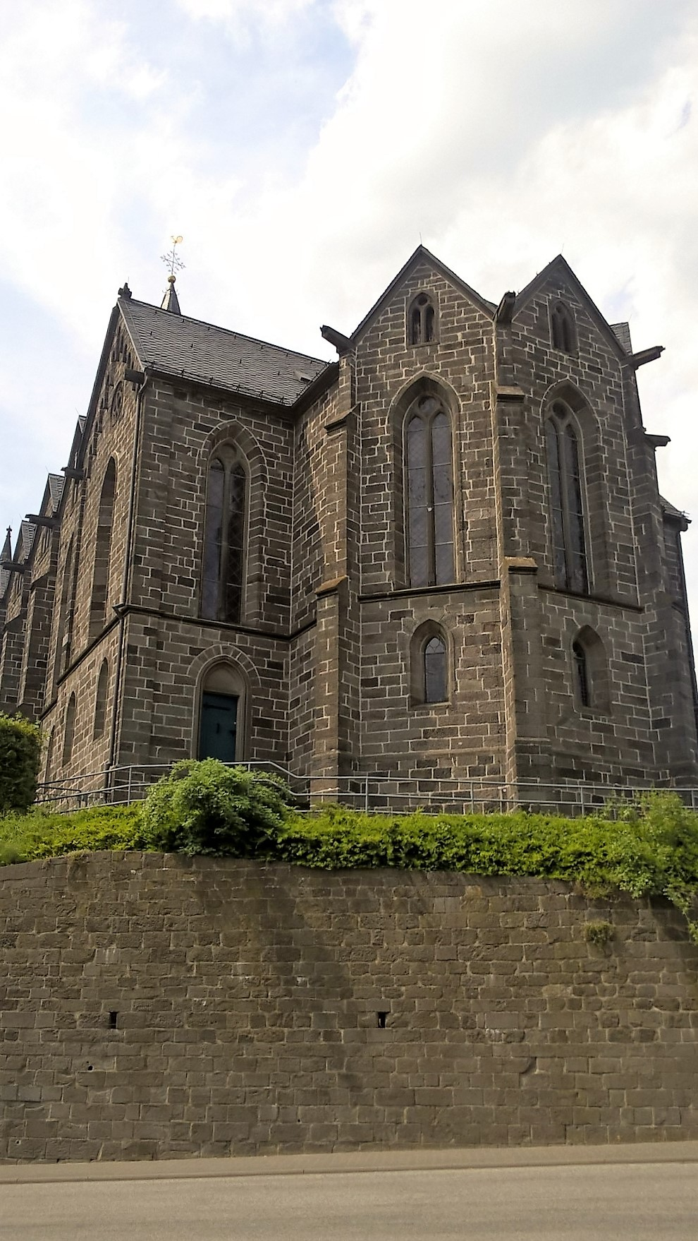 Evangelische Kirche Londorf, Rabenau, Landkreis Gießen, Hessen, Deutschland